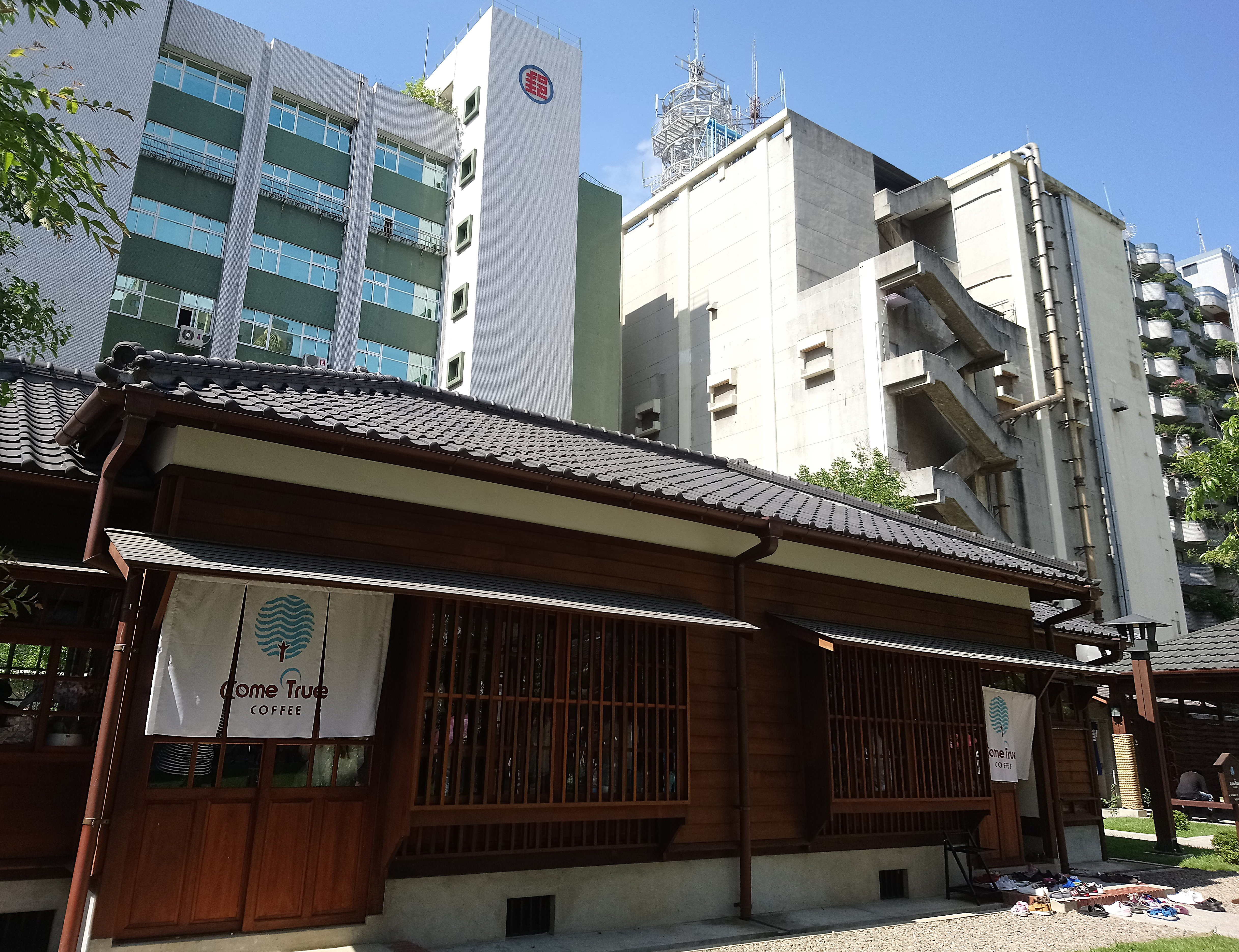 桃園警察局日式宿舍群,桃園市桃園區市中次分區文化里